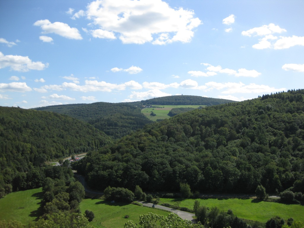 Ansicht Pferdskopf (Taunus) aus Richtung Altweilnau (Weiltal)